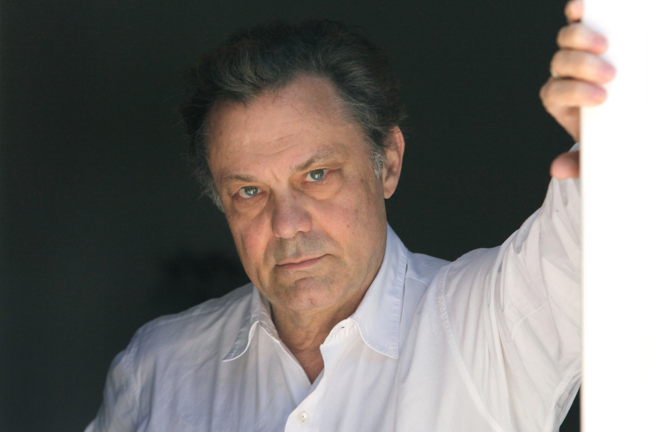 Portrait de Philippe Caubère par Michèle Laurent